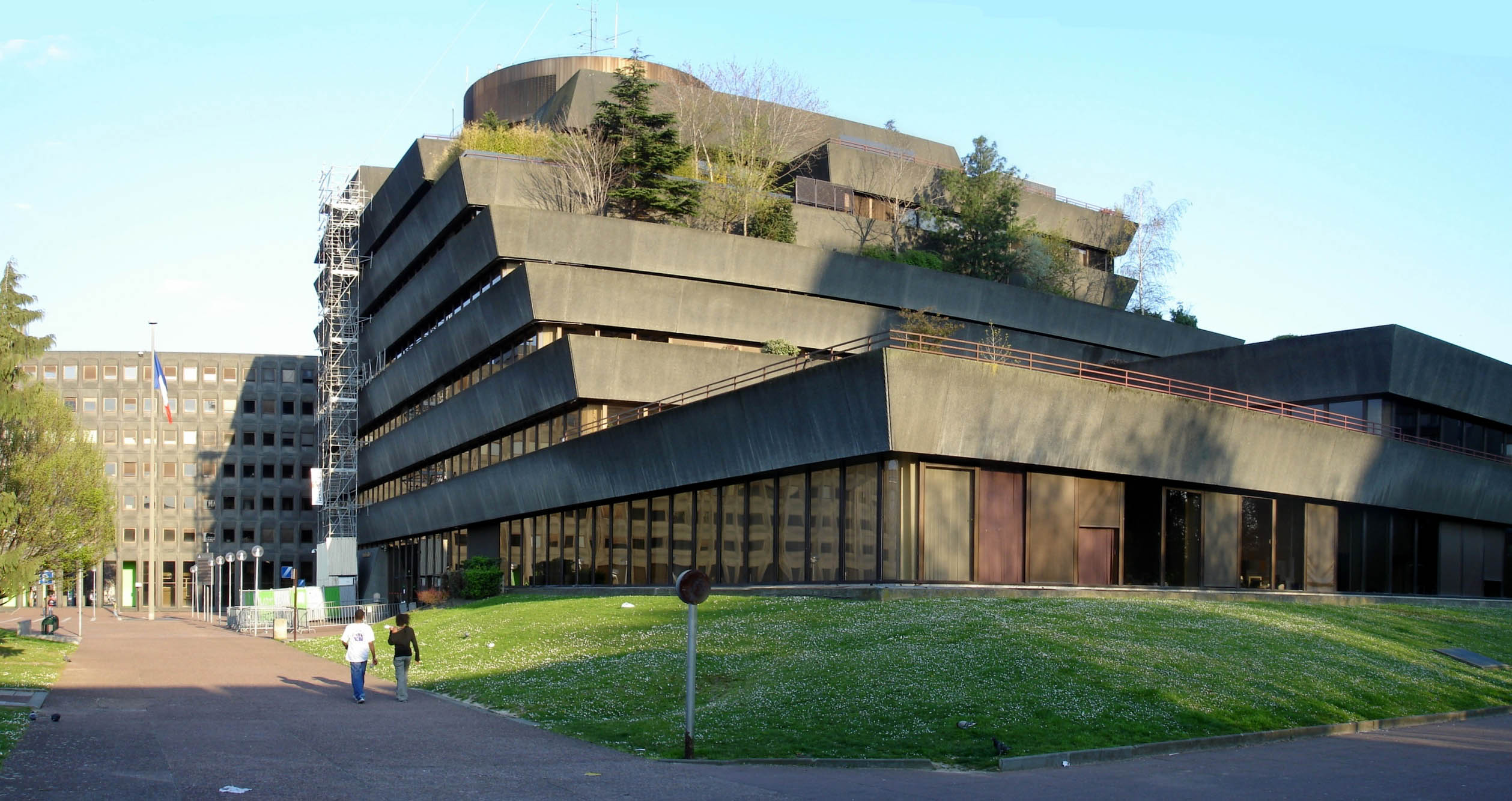 La préfecture à Bobigny (Seine-Saint-Denis), France